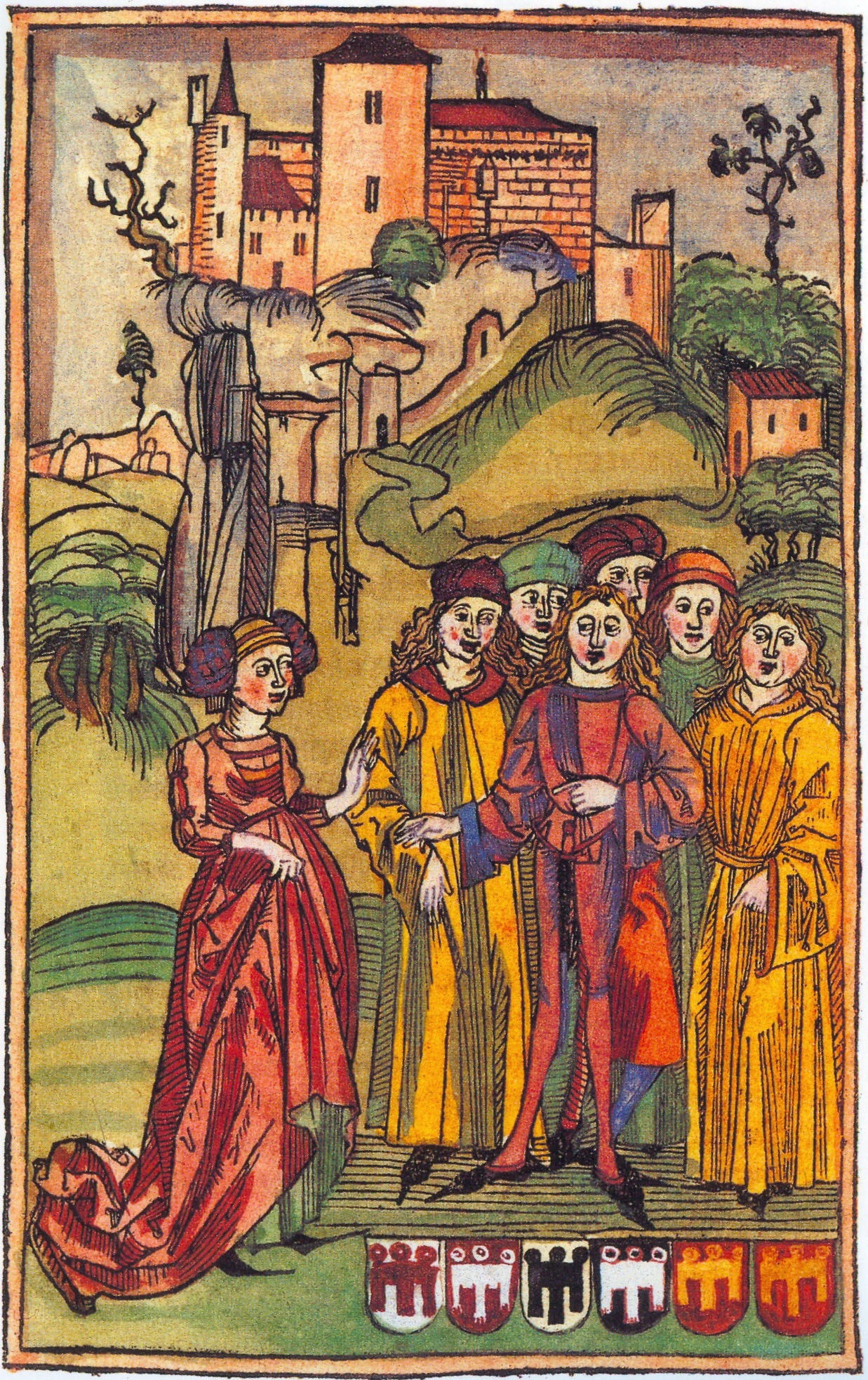 Die Grafen von Rotenfahn (Tübingen, Montfort, Werdenberg), Holzschnitt